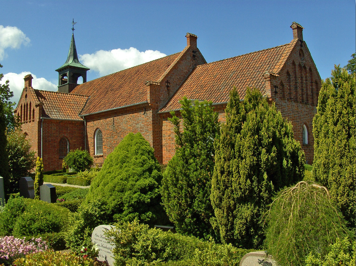 fra sydøst